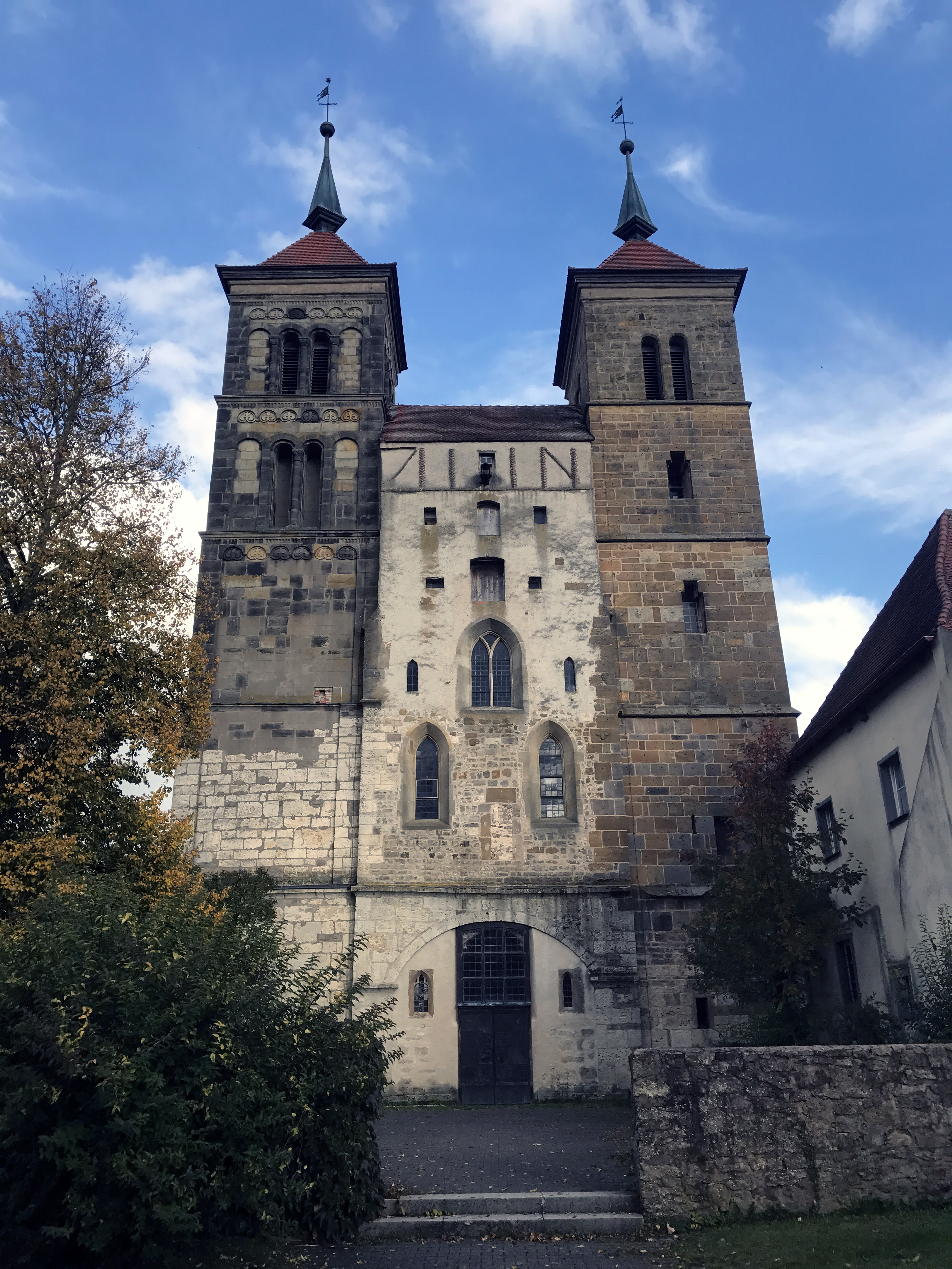 Westfassade von St. Maria und Godehard in D-86736 Auhausen